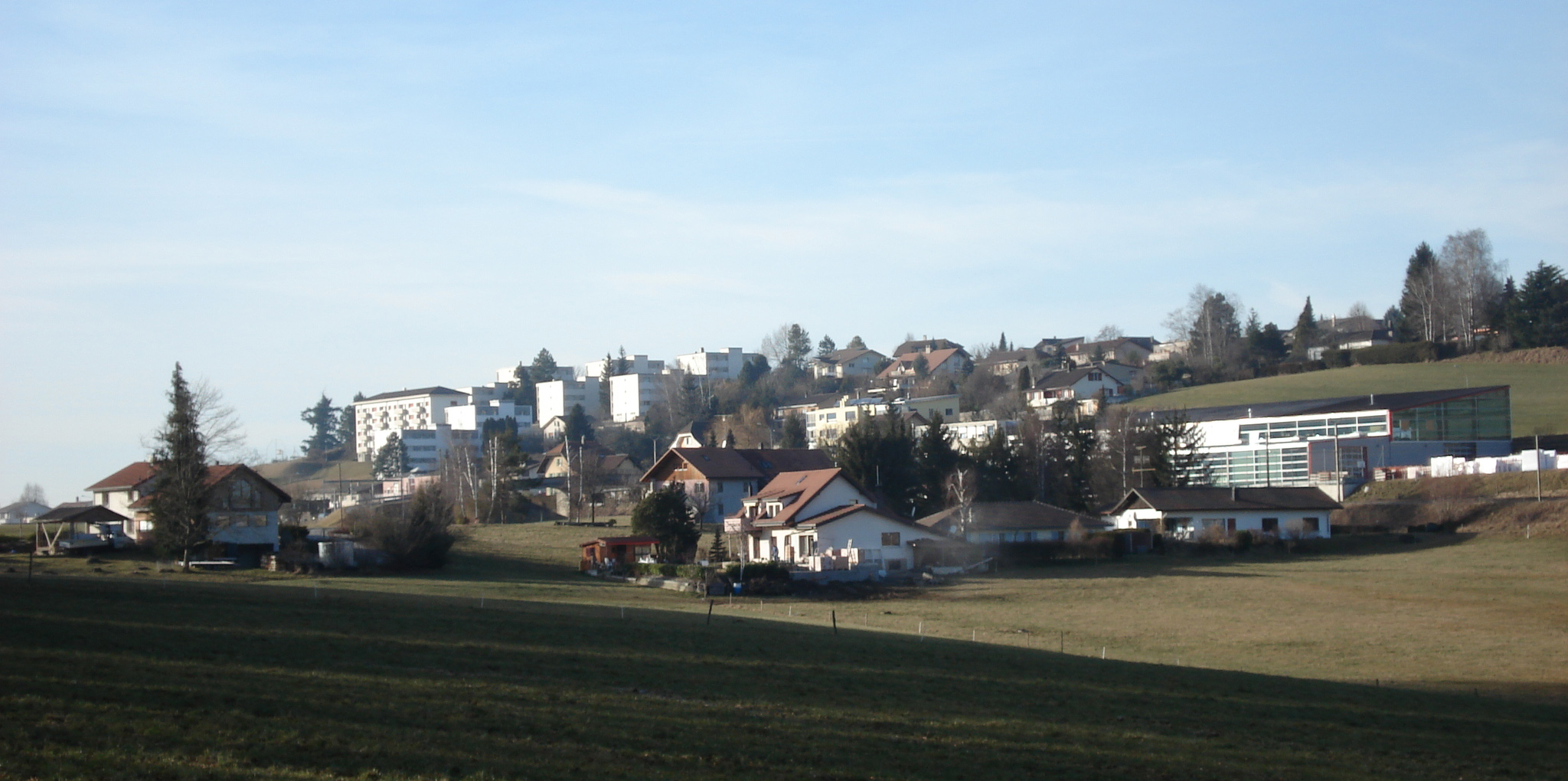 Avry, Quartier de la Praly